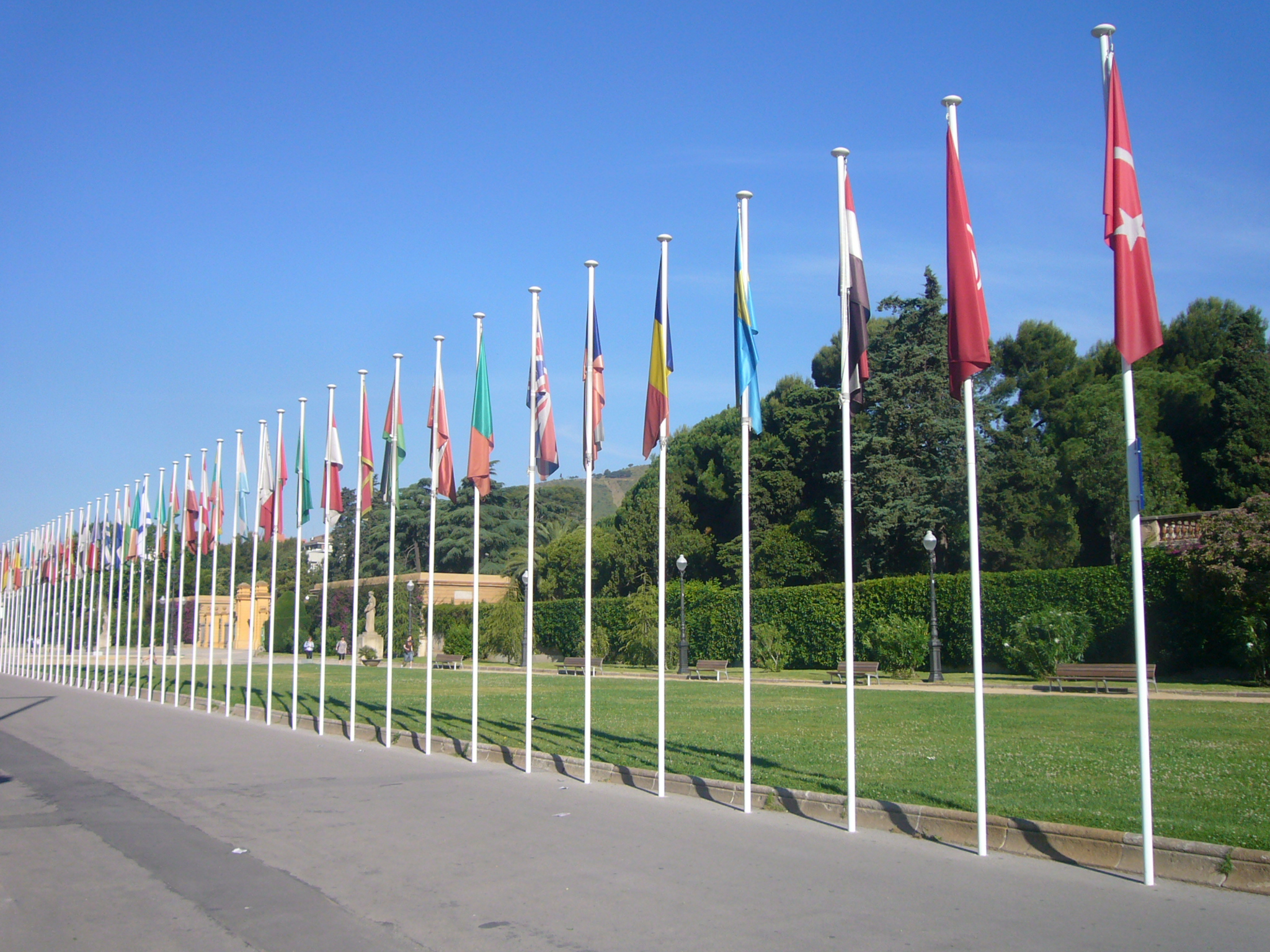 Banderas de los países de la Unión por el Mediterráneo (UpM), situadas en la entrada del Palacio de Pedralbes, en Barcelona, España.